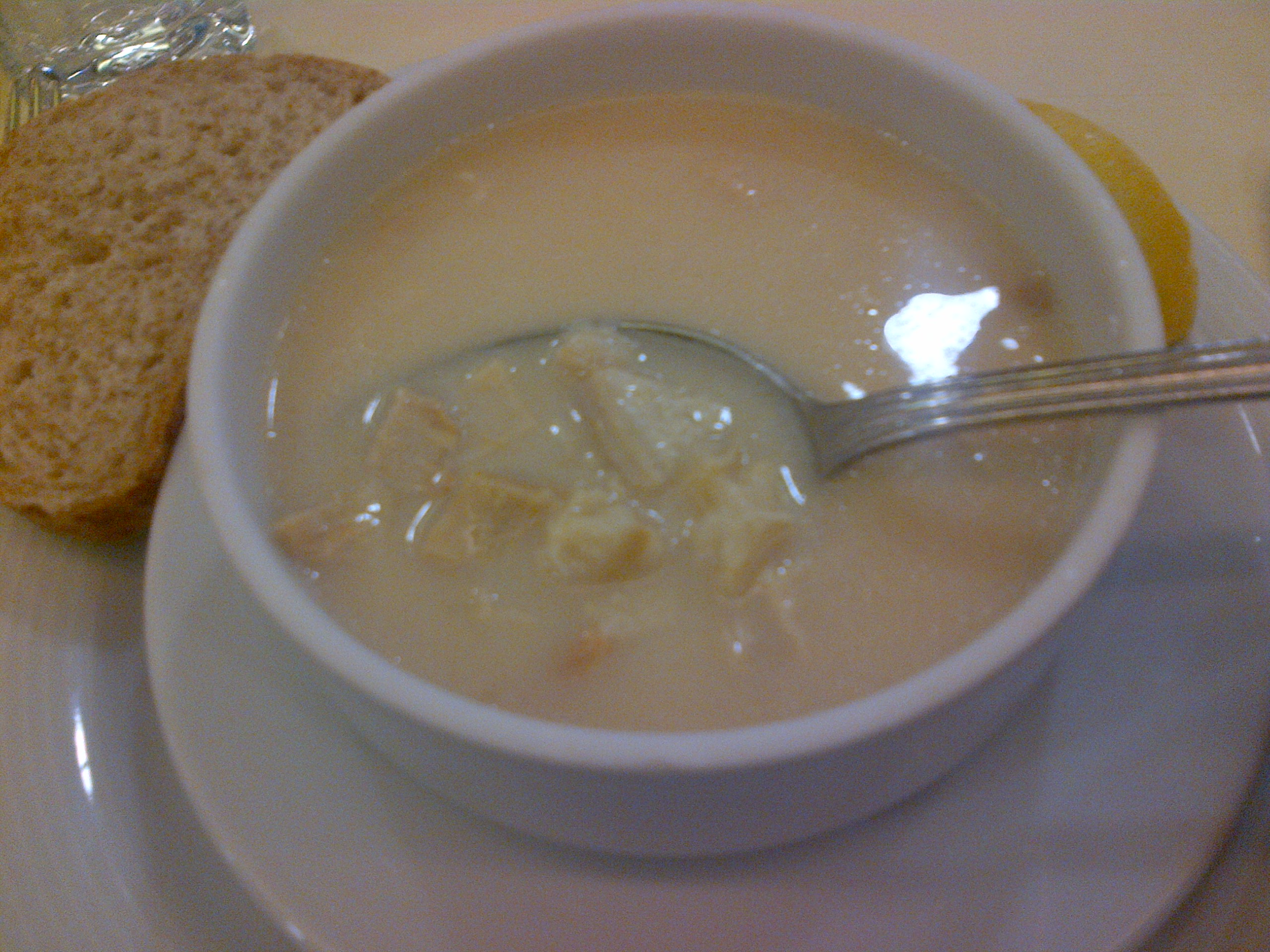 Sopa de tripa (işkembe) de la cocina turca.